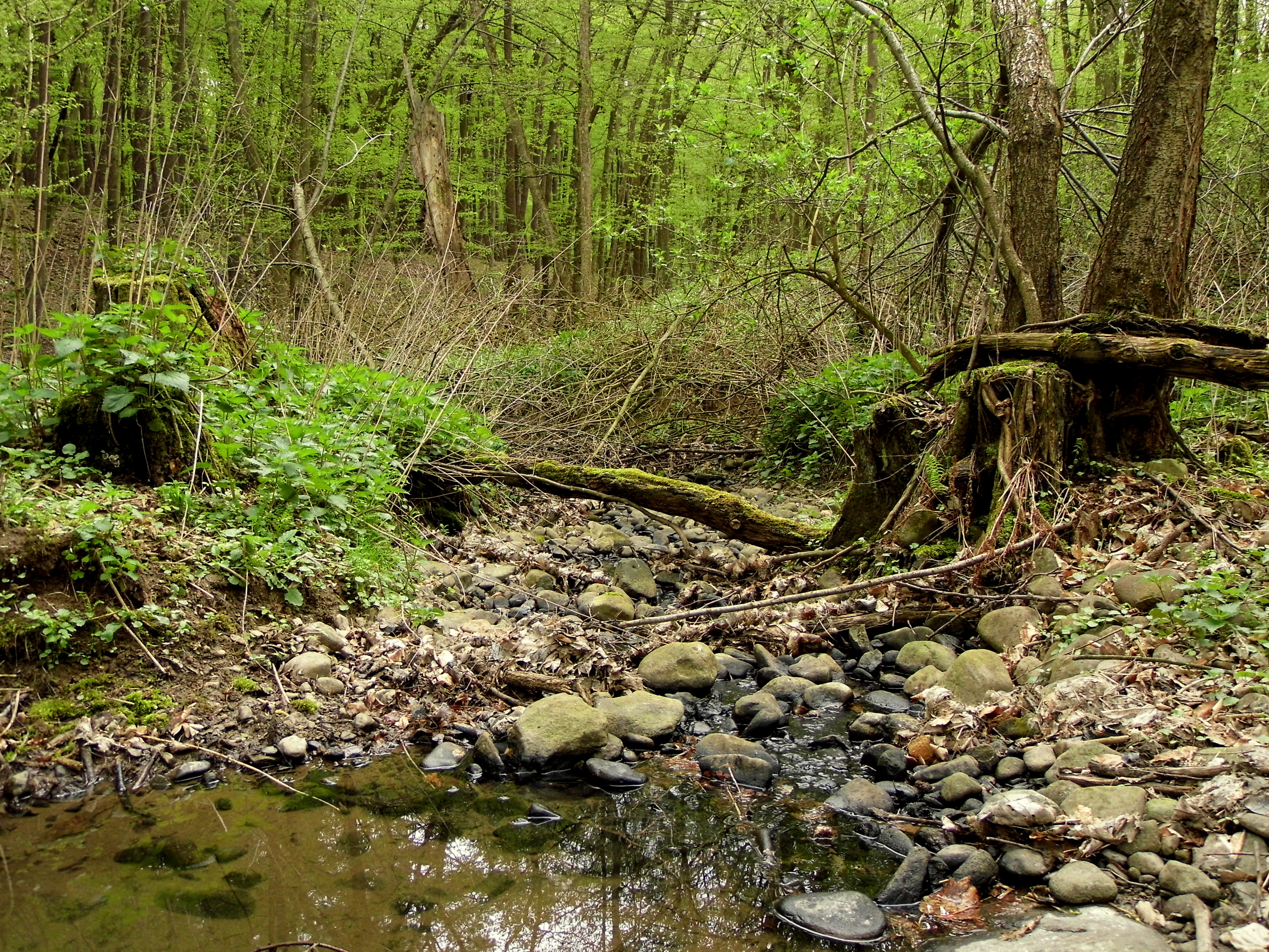 gymeš